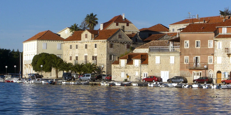 Milna, Brač, Hrvatska - pogled sa Žala na Blatašku rivu